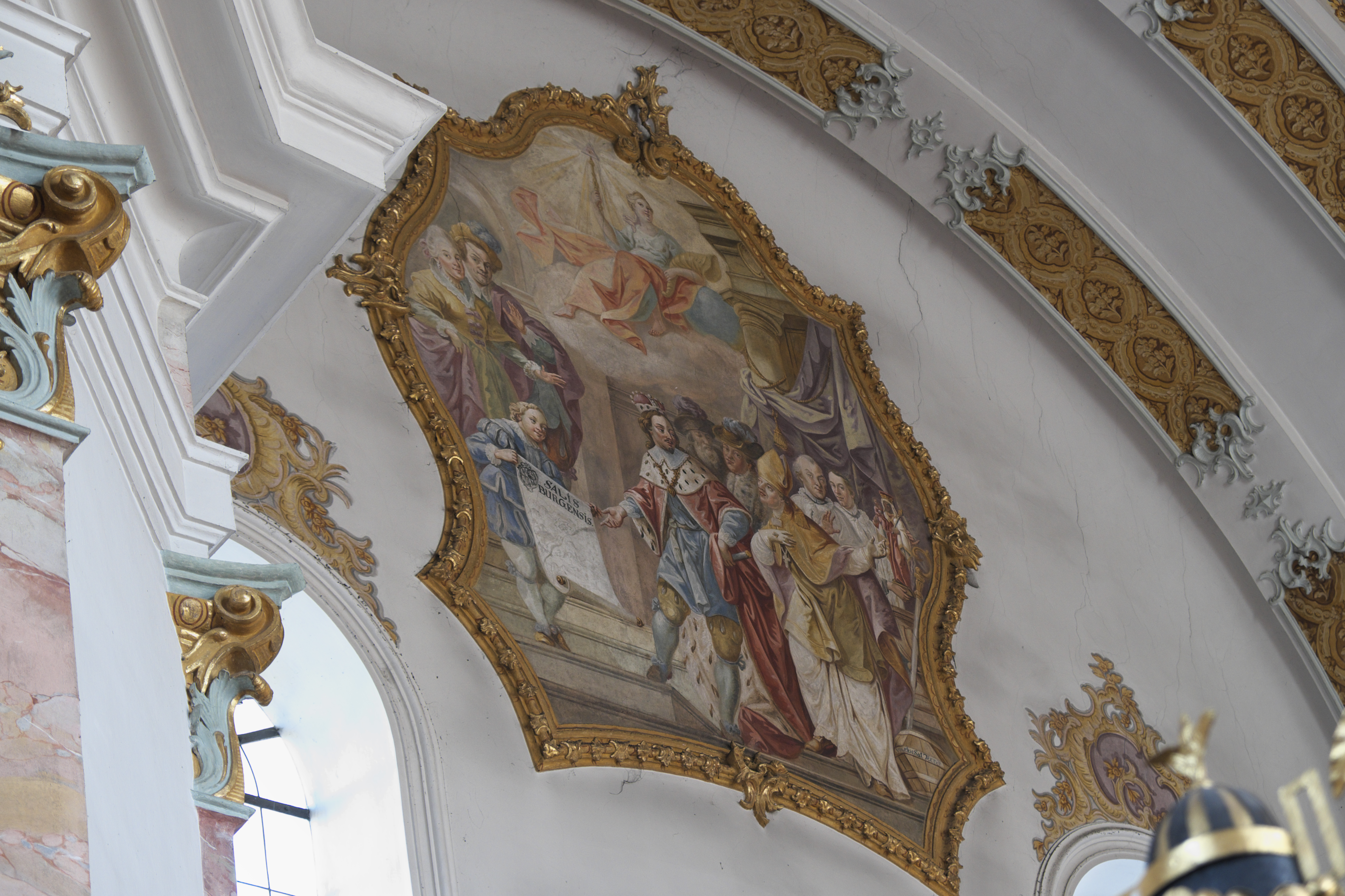 Katholische Pfarrkirche St. Vitus in Kirchweidach im Landkreis Altötting (Bayern/Deutschland), Fresko von Franz Joseph Soll; Darstellung: Herzog Theodo II. lässt die Schenkungsurkunde von Salzburg dem heiligen Rupertus überreichen